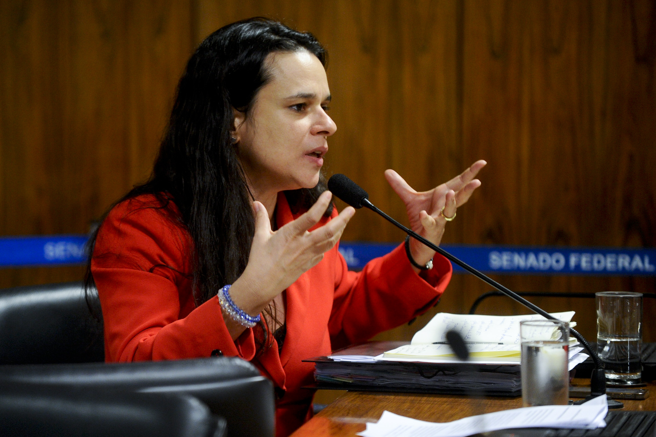 Comissão Especial do Impeachment 2016 (CEI2016) realiza reunião para ouvir testemunhas. Em pronunciamento, jurista Janaína Paschoal. Foto: Jefferson Rudy/Agência Senado